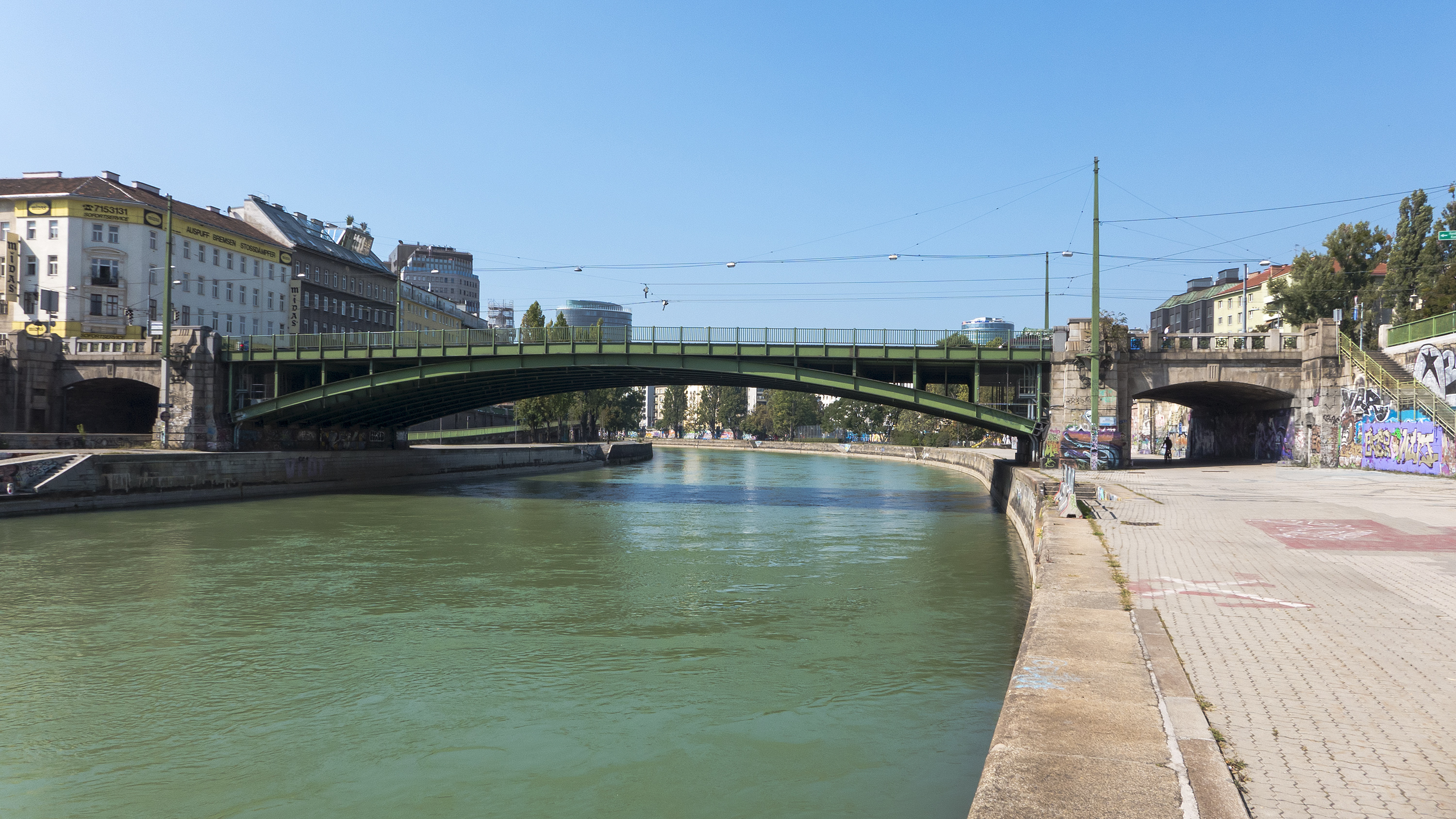 Franzensbrücke in Wien 2 Richtung Westen